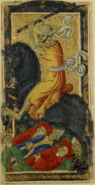 Charles VI (or Gringonneur) Deck; Le tarot dit de Charles VI